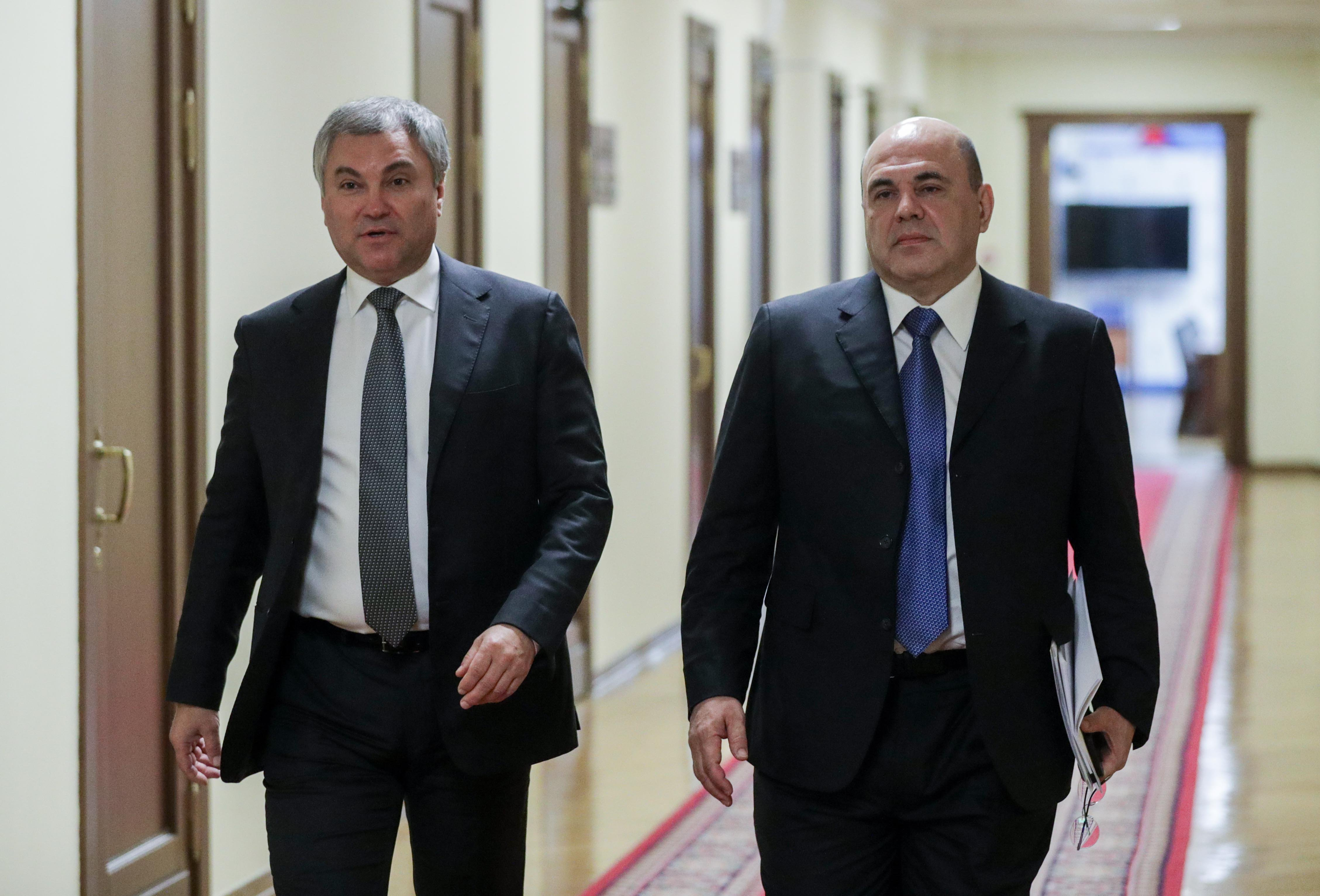 Председатель Государственной Думы Вячеслав Володин и кандидат на пост Председателя Правительства РФ Михаил Мишустин